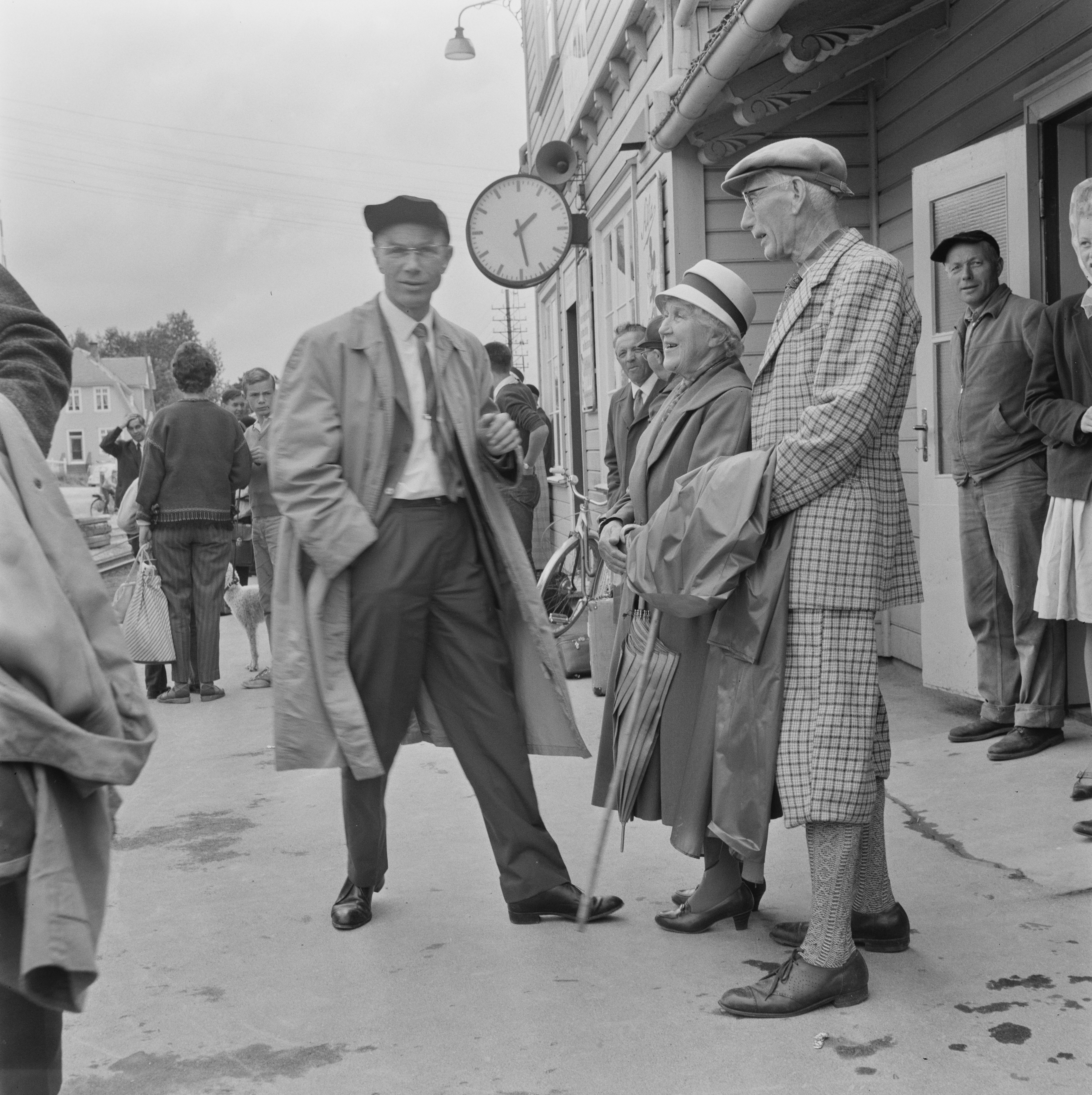 Bildet er hentet fra Arkivverket. Foto tatt i forbindelse med reportasje om den norske filmen Freske fraspark fra 1963. Manus var ved Kjell Aukrust og Bjørn Breigutu. Regi ved Bjørn Breigutu. Kjell Aukrust, Leif Juster, Turid Caldwell, Alfhild Hovdan, Per Bistrup, Lalla Carlsen Arkivinstitusjon : Riksarkivet Arkivnavn : Billedbladet NÅ Sted : Norge, Hedmark, Alvdal, Emneord: Film, Filminnspilling Avbildet